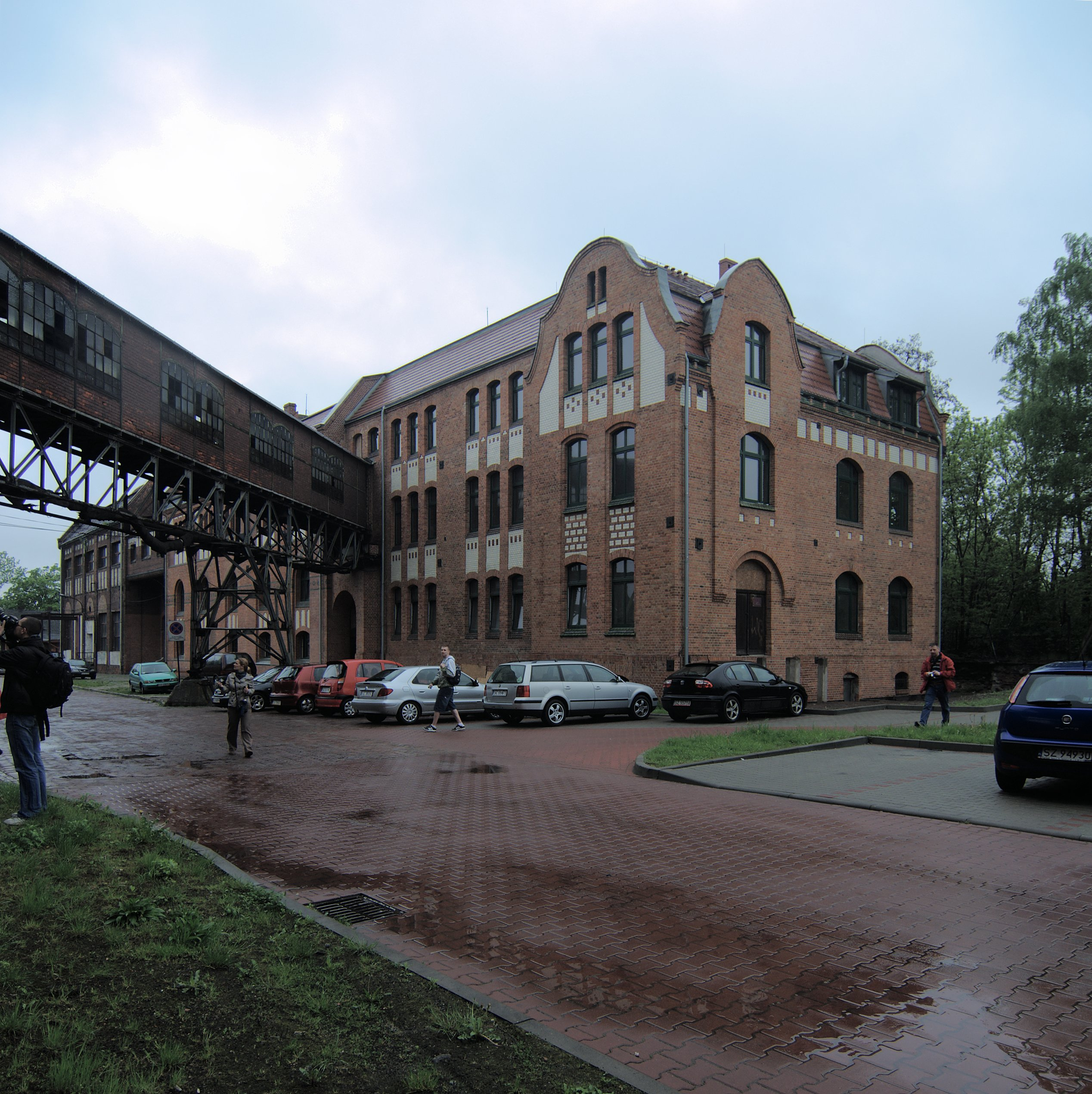 Kopalnia Ludwik.